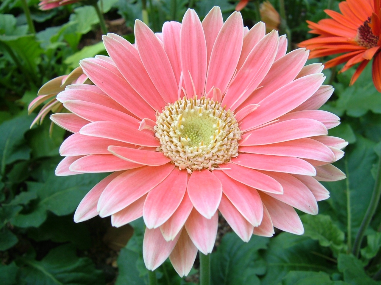 靱公園のガーベラ Gerbera L. (Utsubo Park, Osaka)